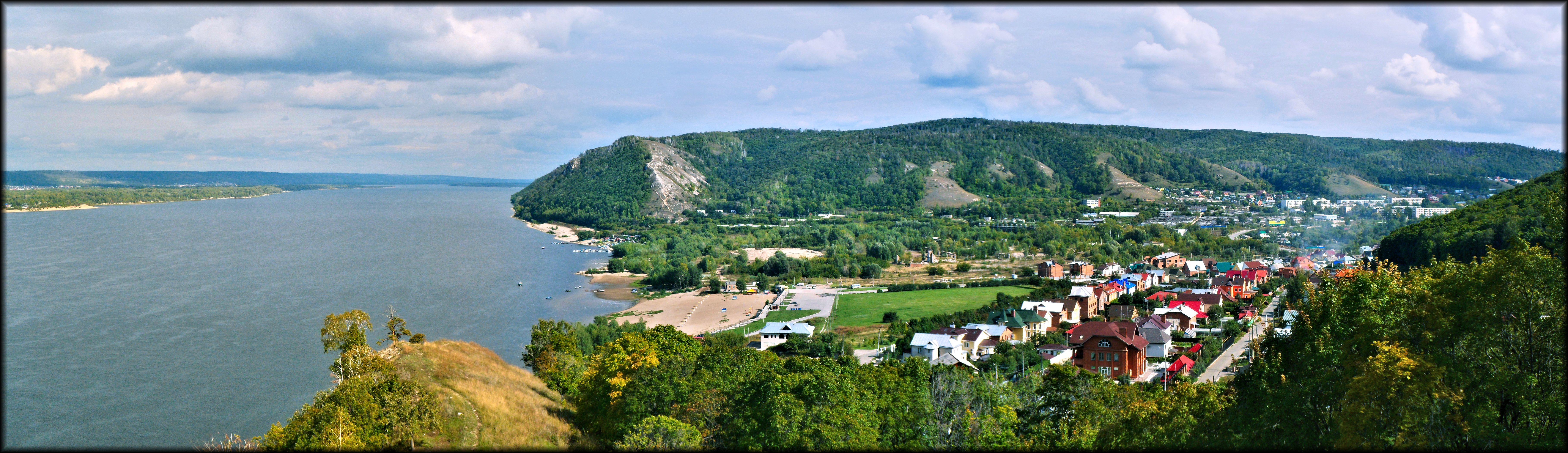 Самарская область, Россия